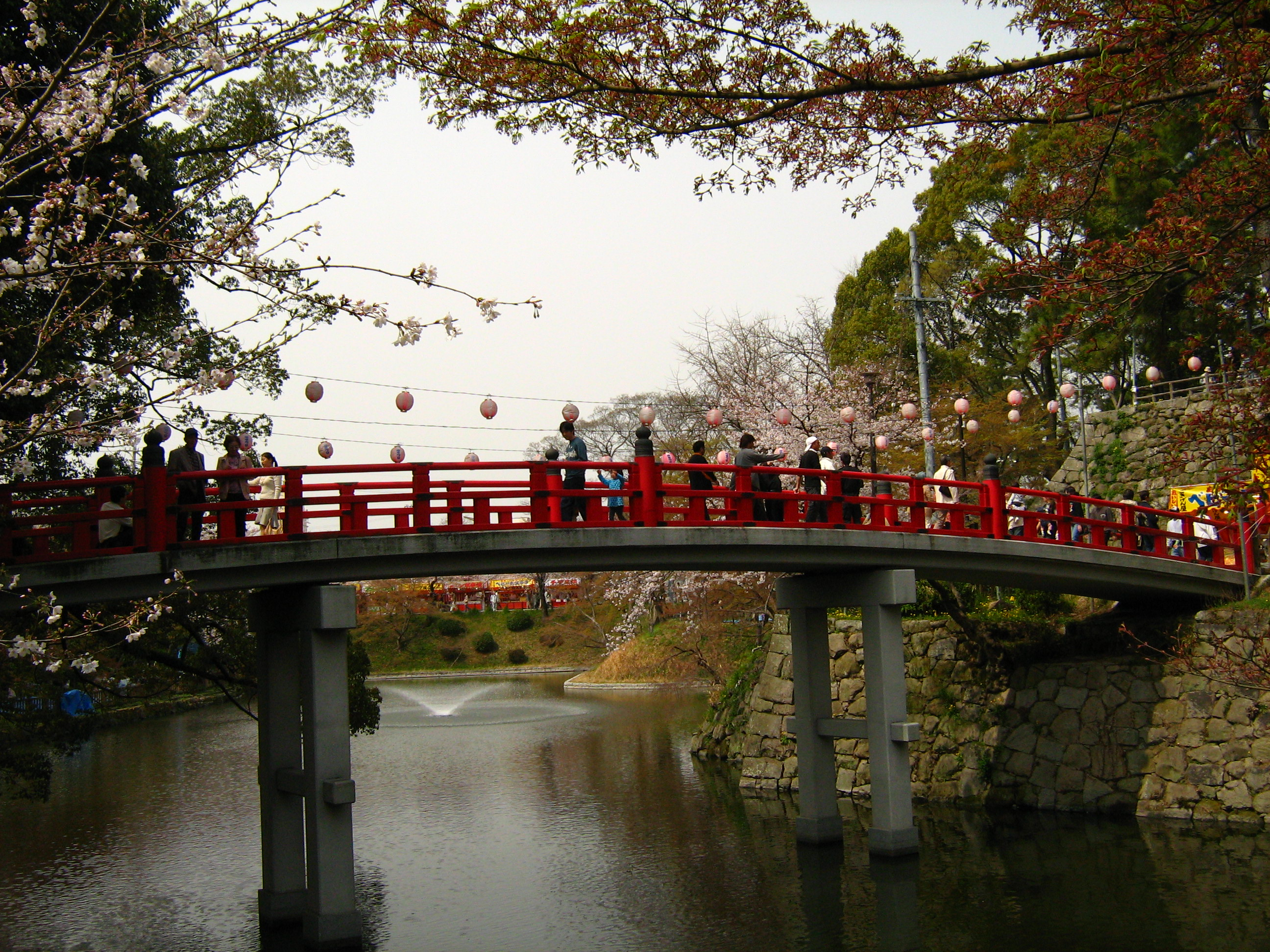 岡崎公園神橋。